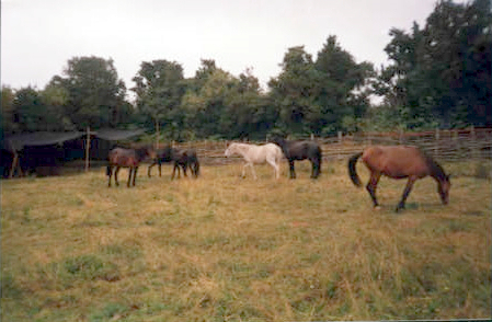 Tropilla de caballos chilotes en el Parque Municipal de Castro, Chile.